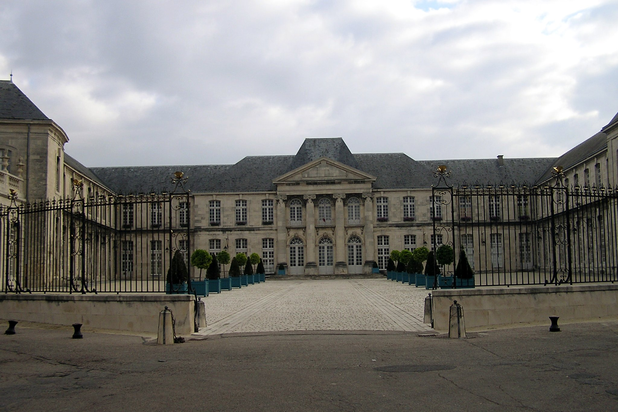 chateau de Commercy